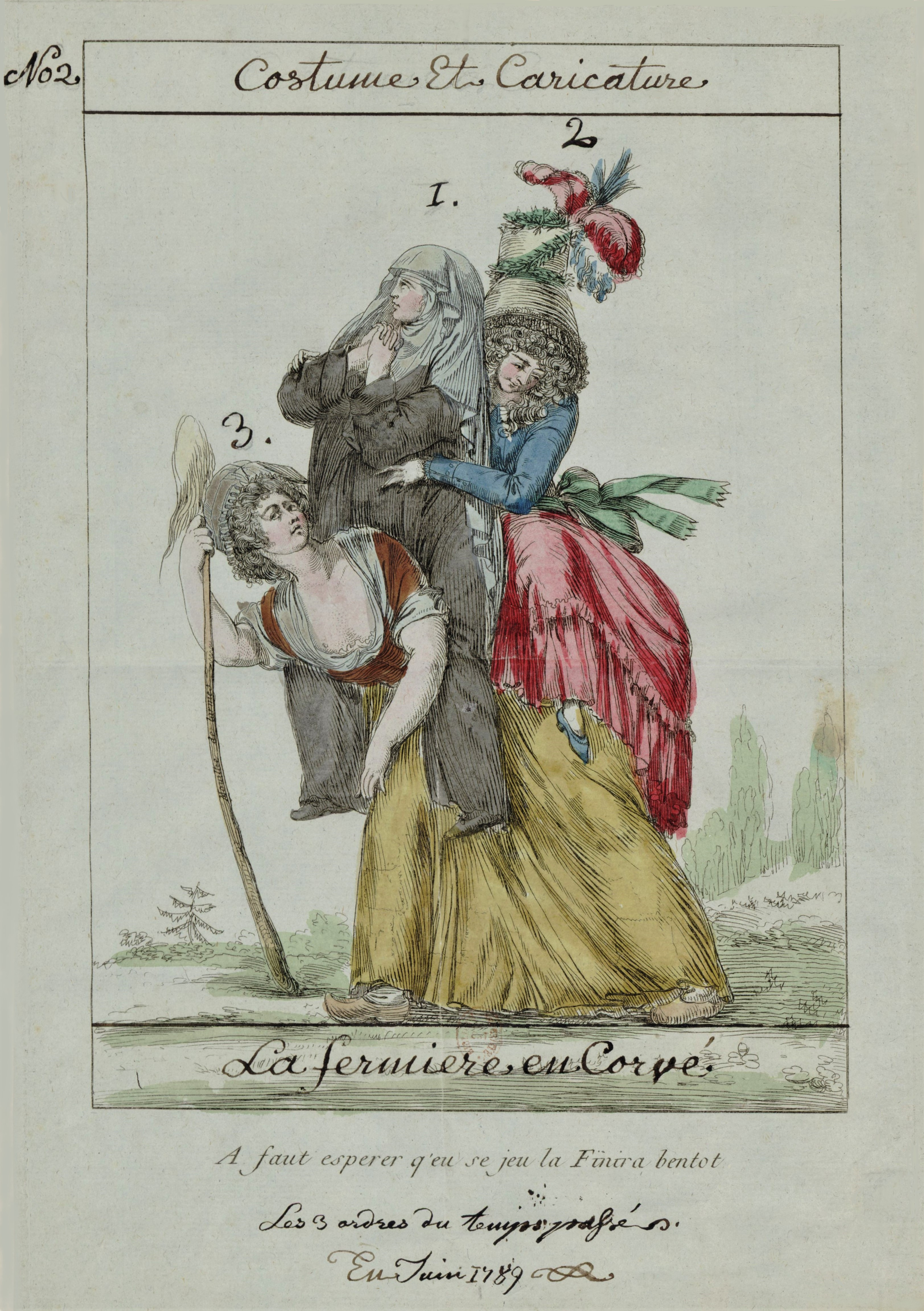 « A faut esperer qu'eu se jeu la finira bentot. » Femme du Tiers état portant sur son dos les femmes de la noblesse et du clergé.